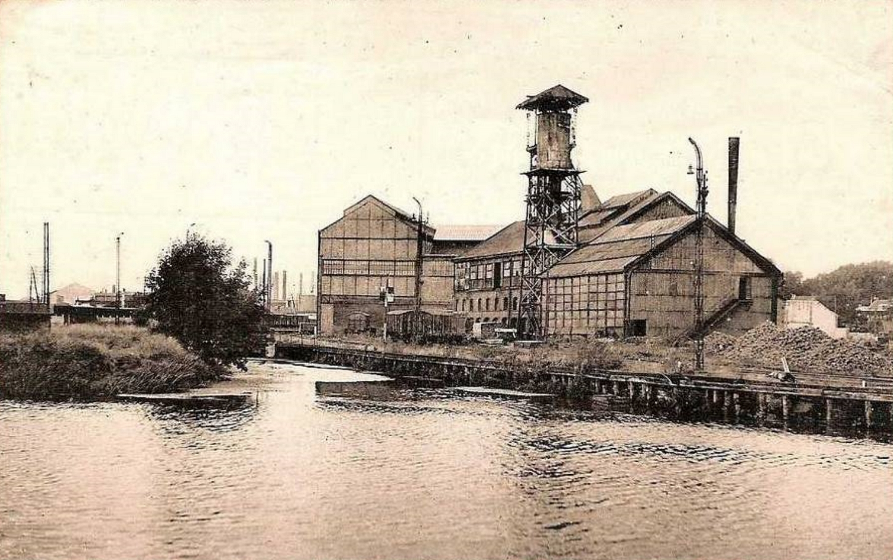 La Fosse n° 3 de la Compagnie des mines de l'Escarpelle était un charbonnage constitué d'un seul puits situé à Flers-en-Escrebieux (Pont-de-la-Deûle), Nord, Nord-Pas-de-Calais, France.